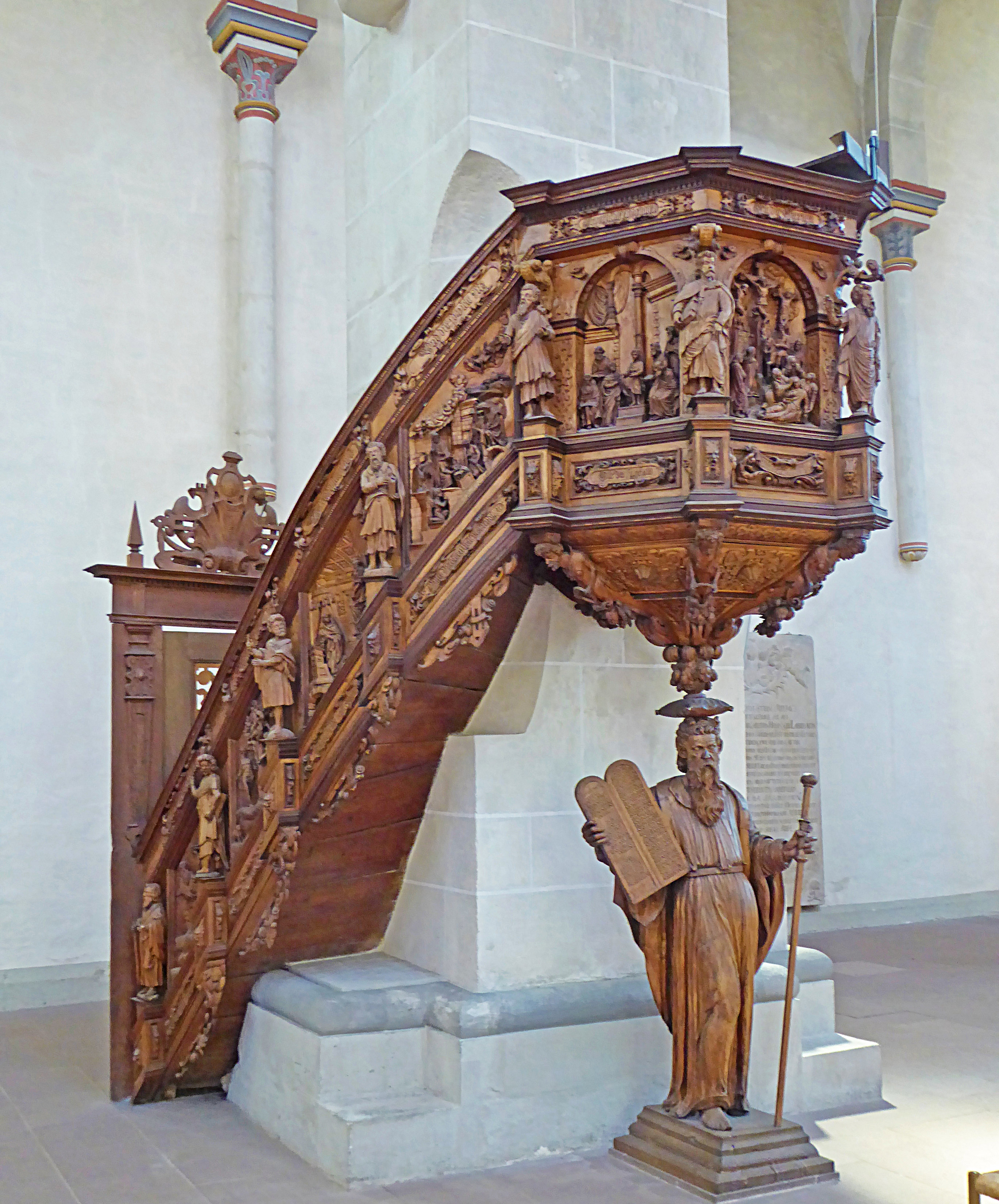 Renaissance-Kanzel aus Lindenholz von 1622 in der Klosterkirche Riddagshausen (Braunschweig)